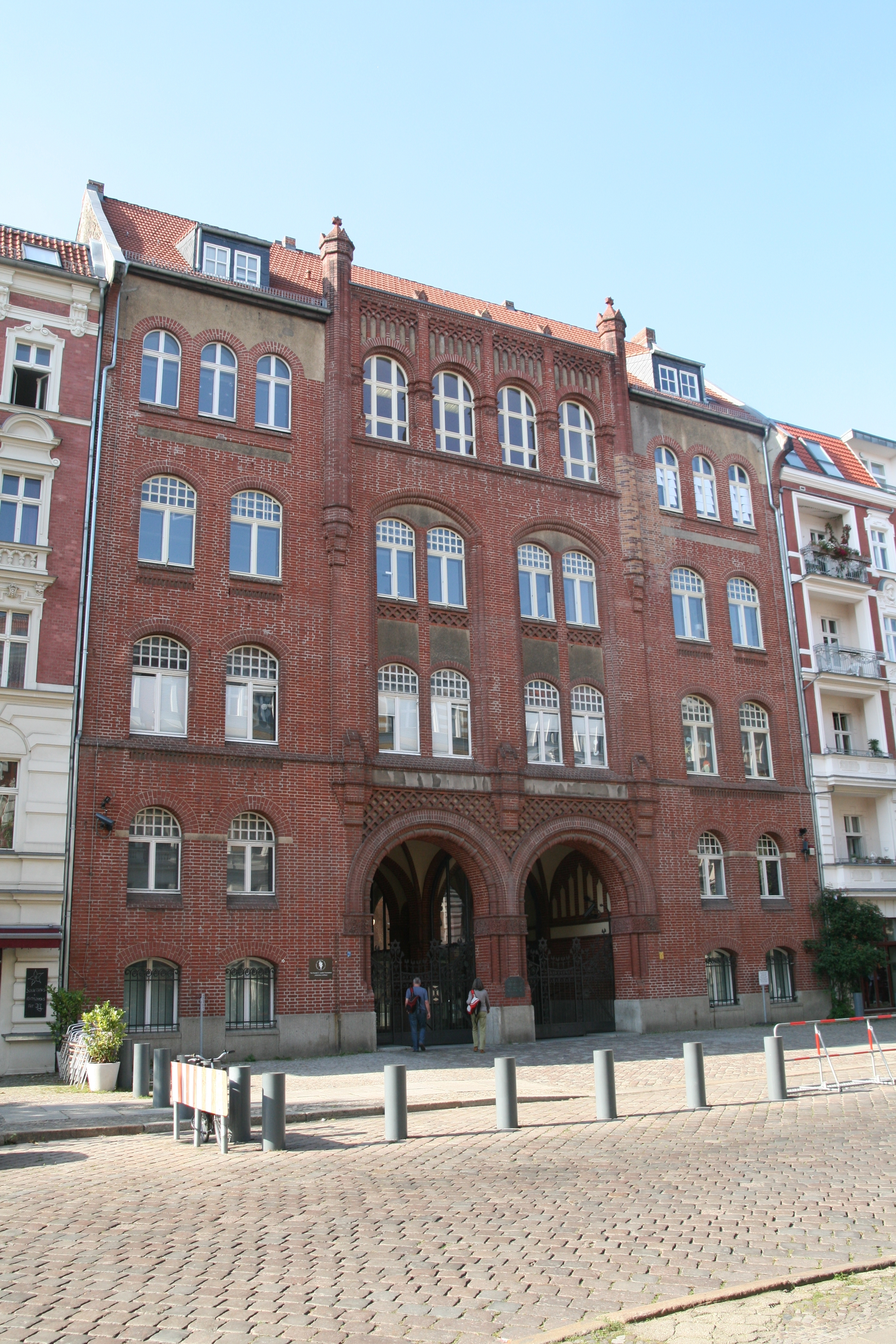 Synagoge " Friedenstempel " - Rykestraße Baudenkmal Rykestraße 53 Berlin - Prenzlauer Berg Quelle : ( LDA ) Landesdenkmalamt - Berlin Dok Nr. 09070254